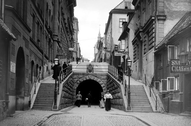 Die Tunnelöffnung des Brunkebergtunnels i Stockholm